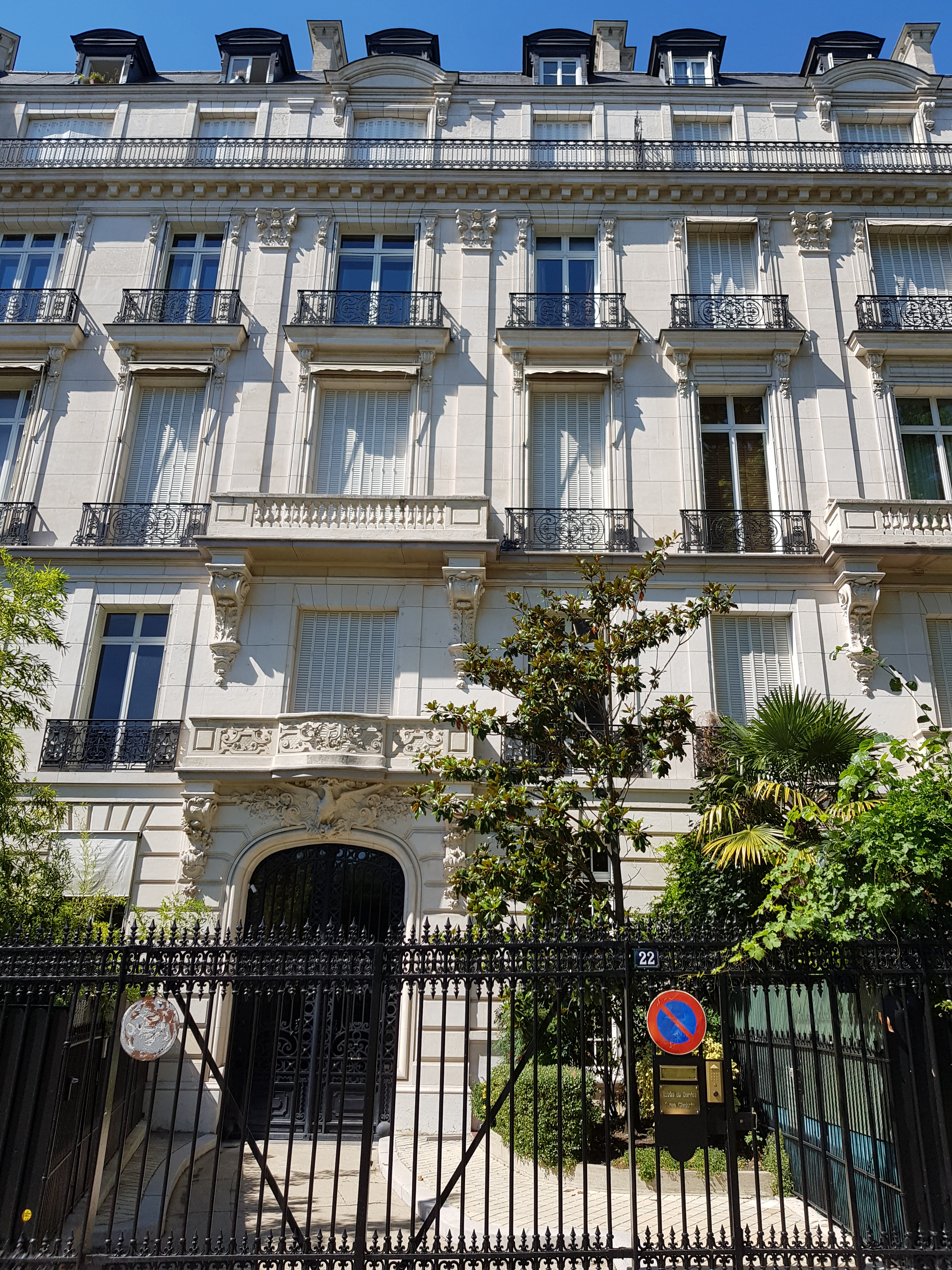 22, avenue Foch, Paris 16e.